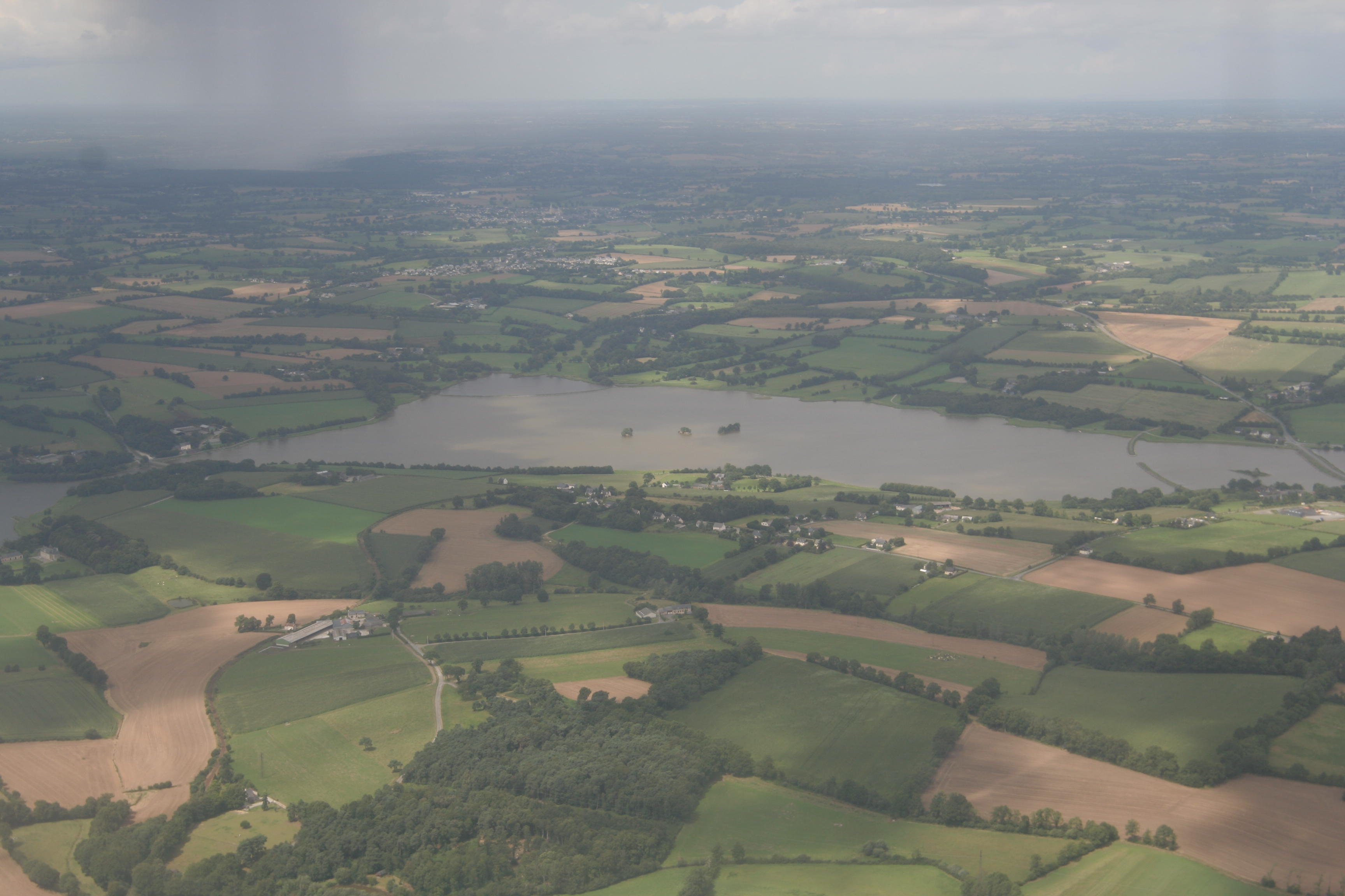 Vue aérienne de l'étang de la Cantache, entre Montreuil-sous-Pérouse, Champeaux (Ille-et-Vilaine) et Pocé-les-Bois.